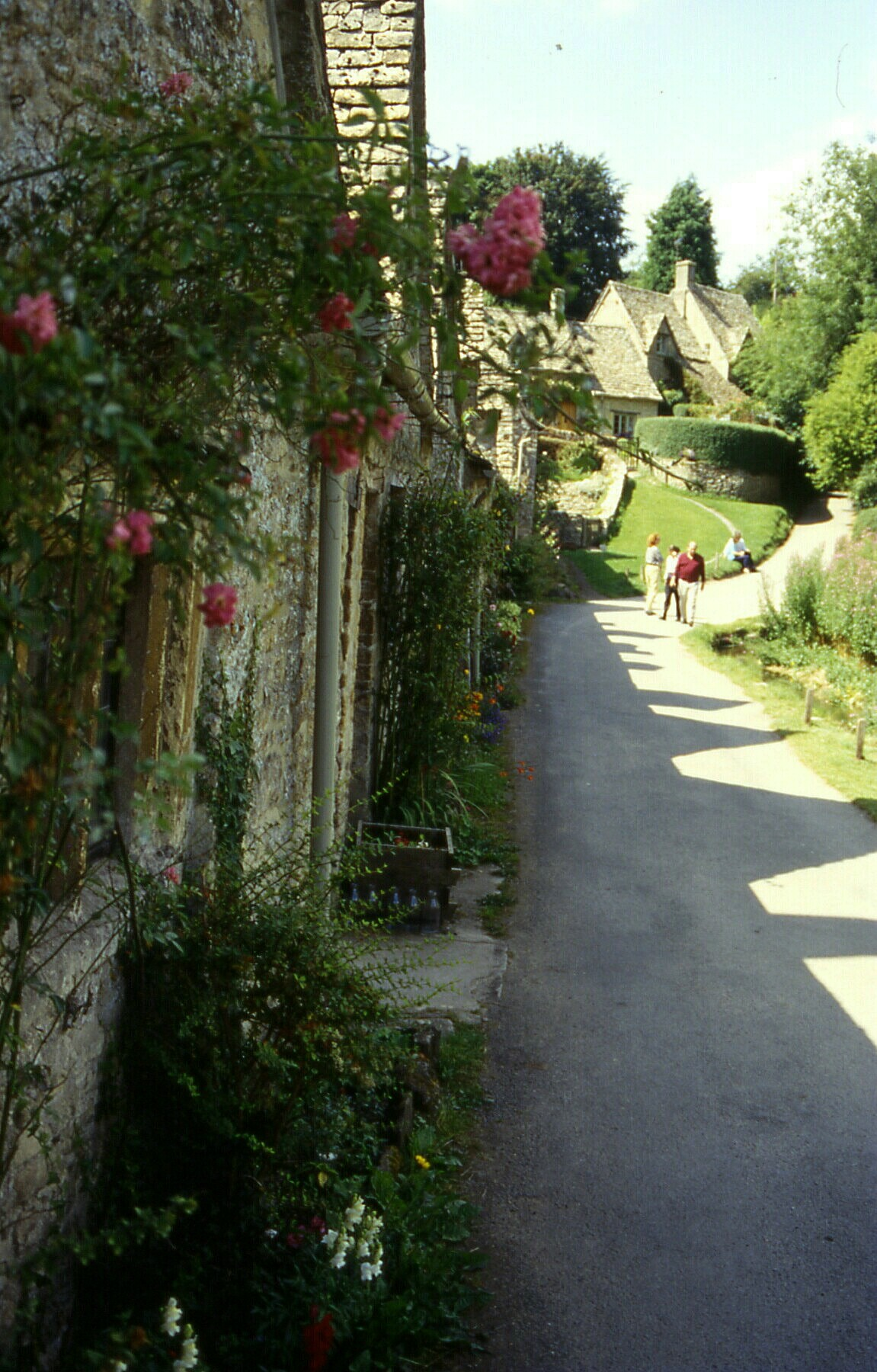 IrlandAdare1993